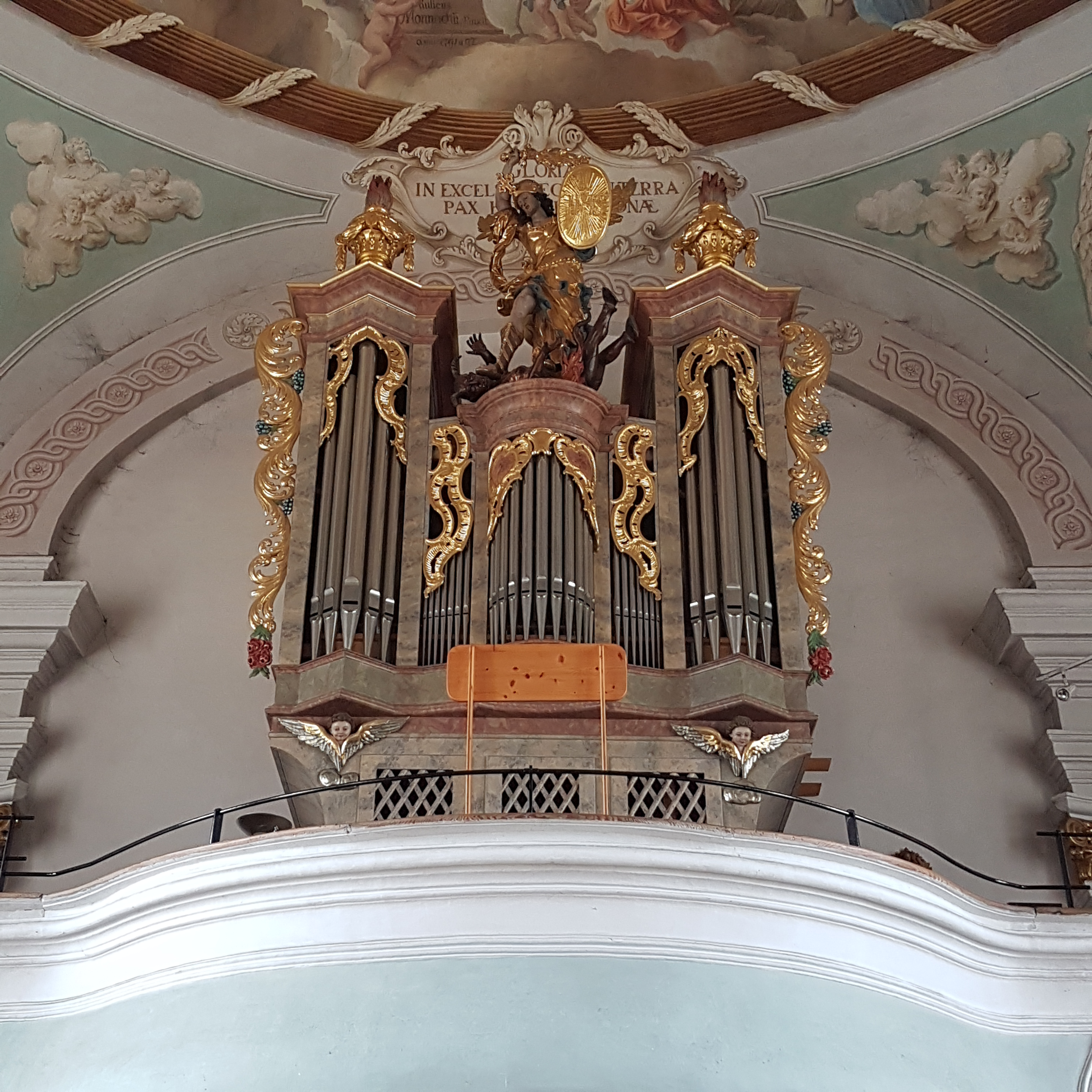 St. Nikolaus (Albaching), Orgel